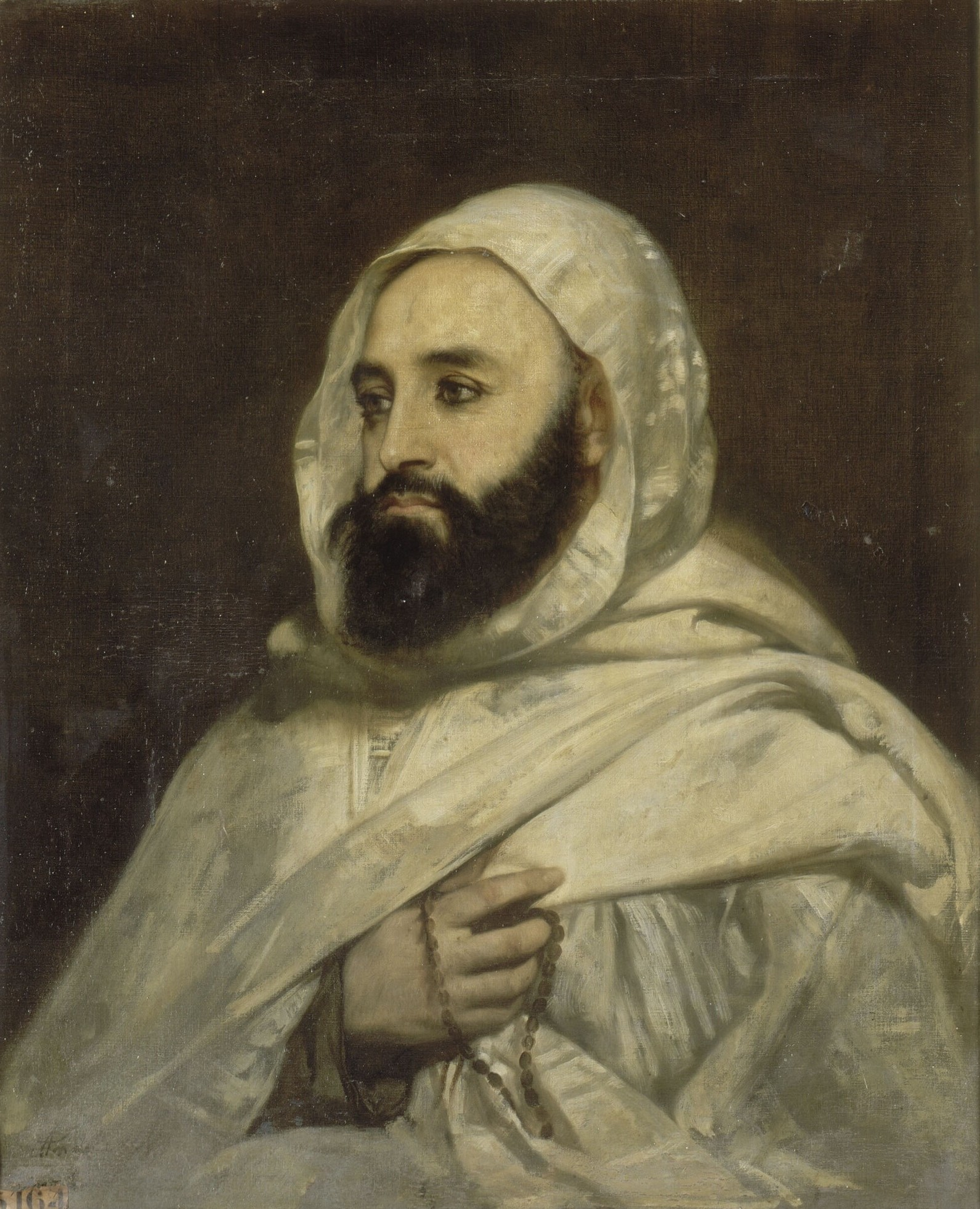 Ange Tissier, Portrait en buste de Ben Mahi ed-Din Abd-el-Kader, émir algérien, 1852. Tableau exécuté au château d'Amboise vers 1852 ; don du Ministère des Beaux-Arts, mars 1879 ; restauration en 1864.